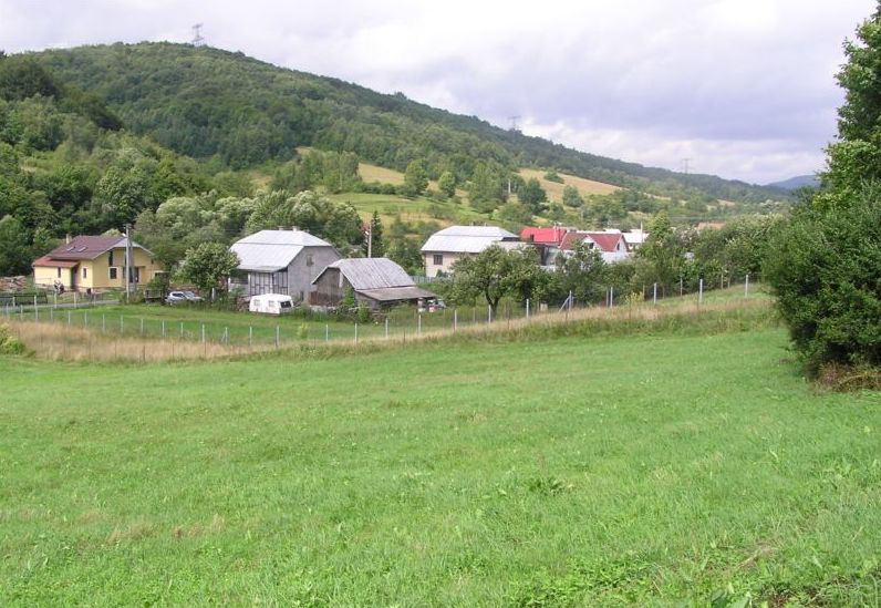 Celkový pohľad